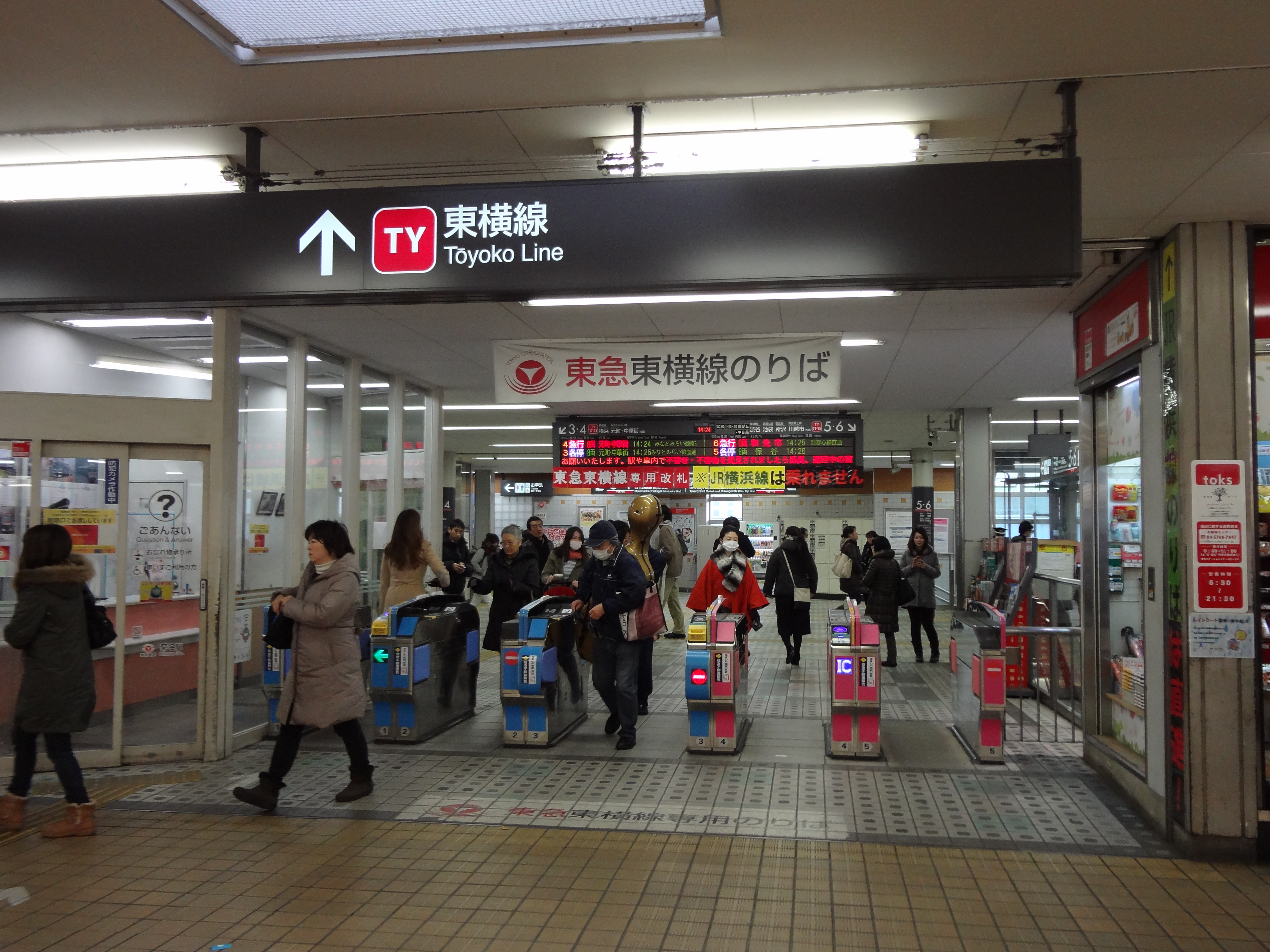 東急線 改札口（2016年1月23日）